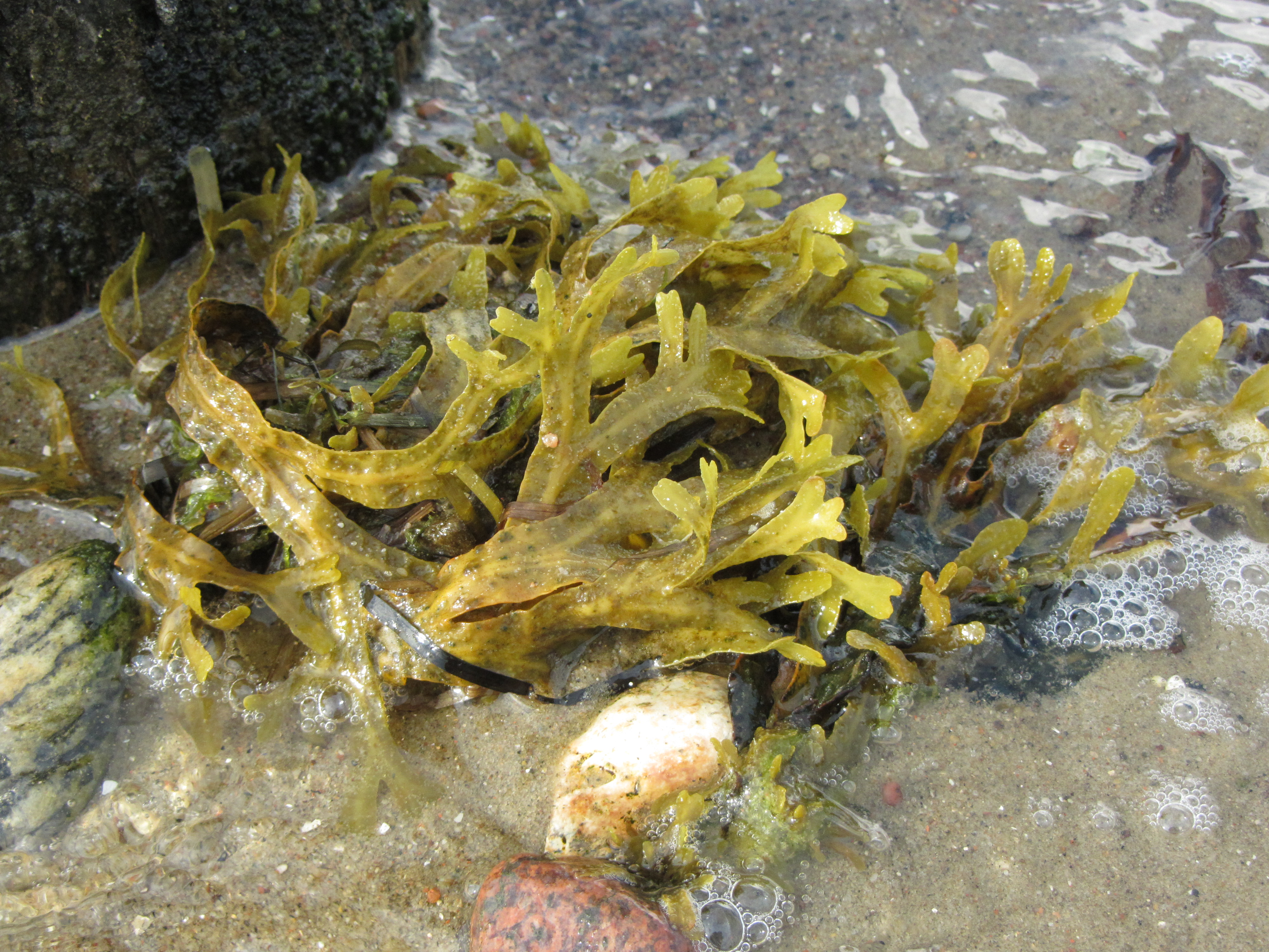 Algen im Strelasund